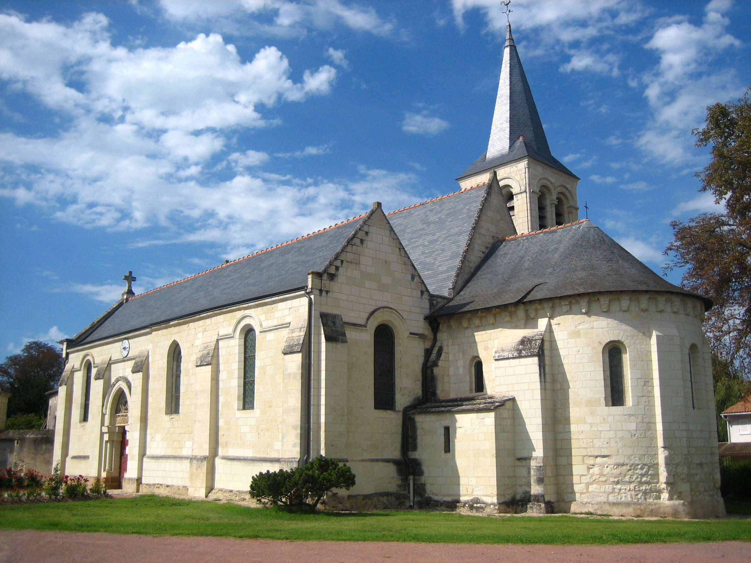 Église de Saint-Martin-de-Sanzay .